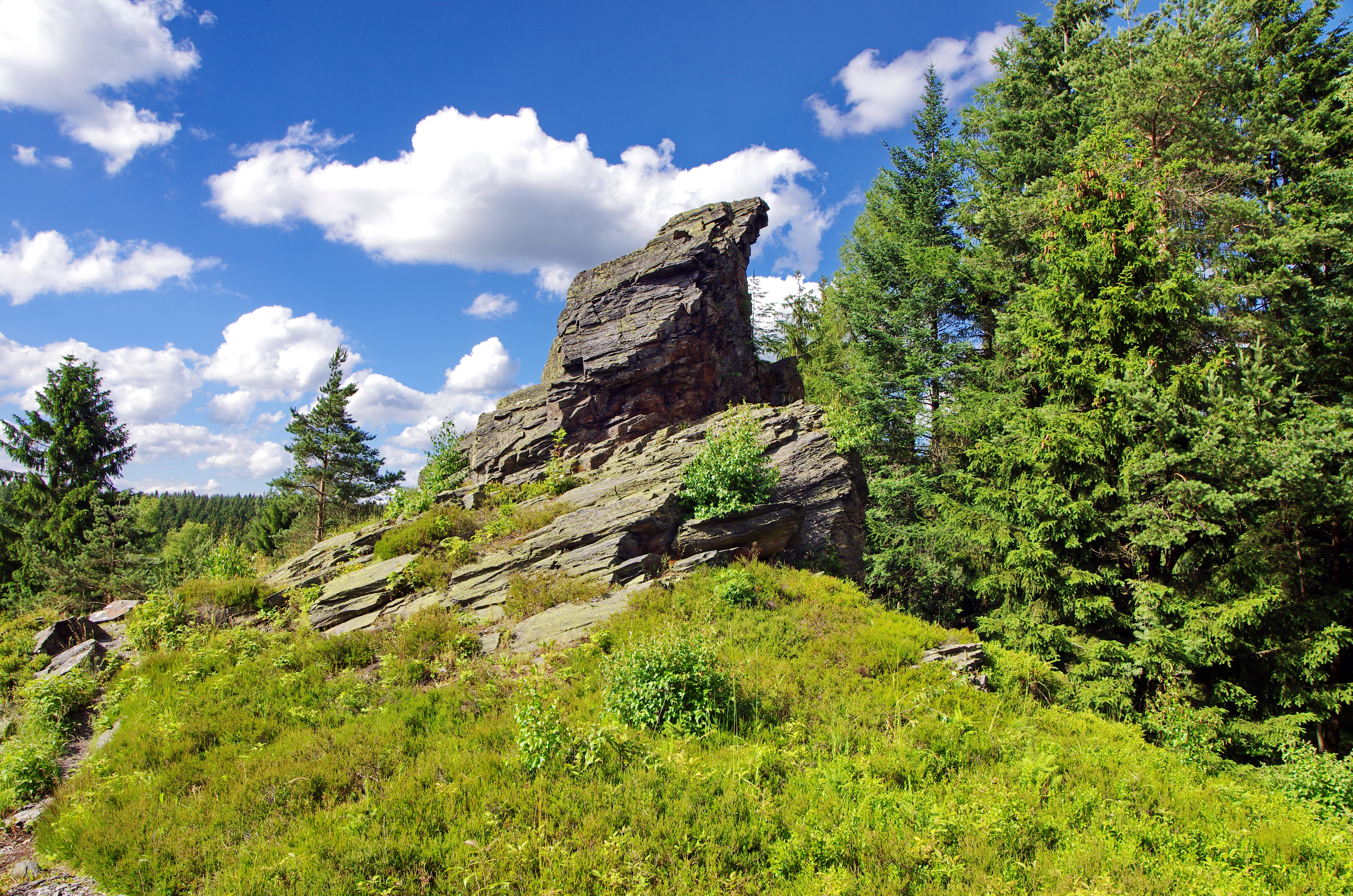 Přírodní památka Vysoký kámen, skalní útvar "zobák", okres Sokolov